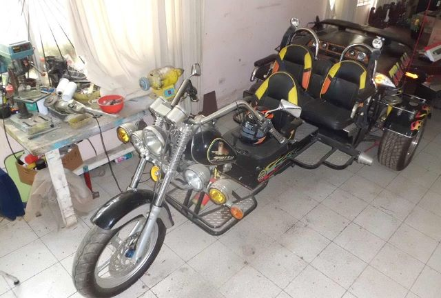 trimoto especial para personas con discapacidad fabricada en chiclayo PERÚ totalmente automática.